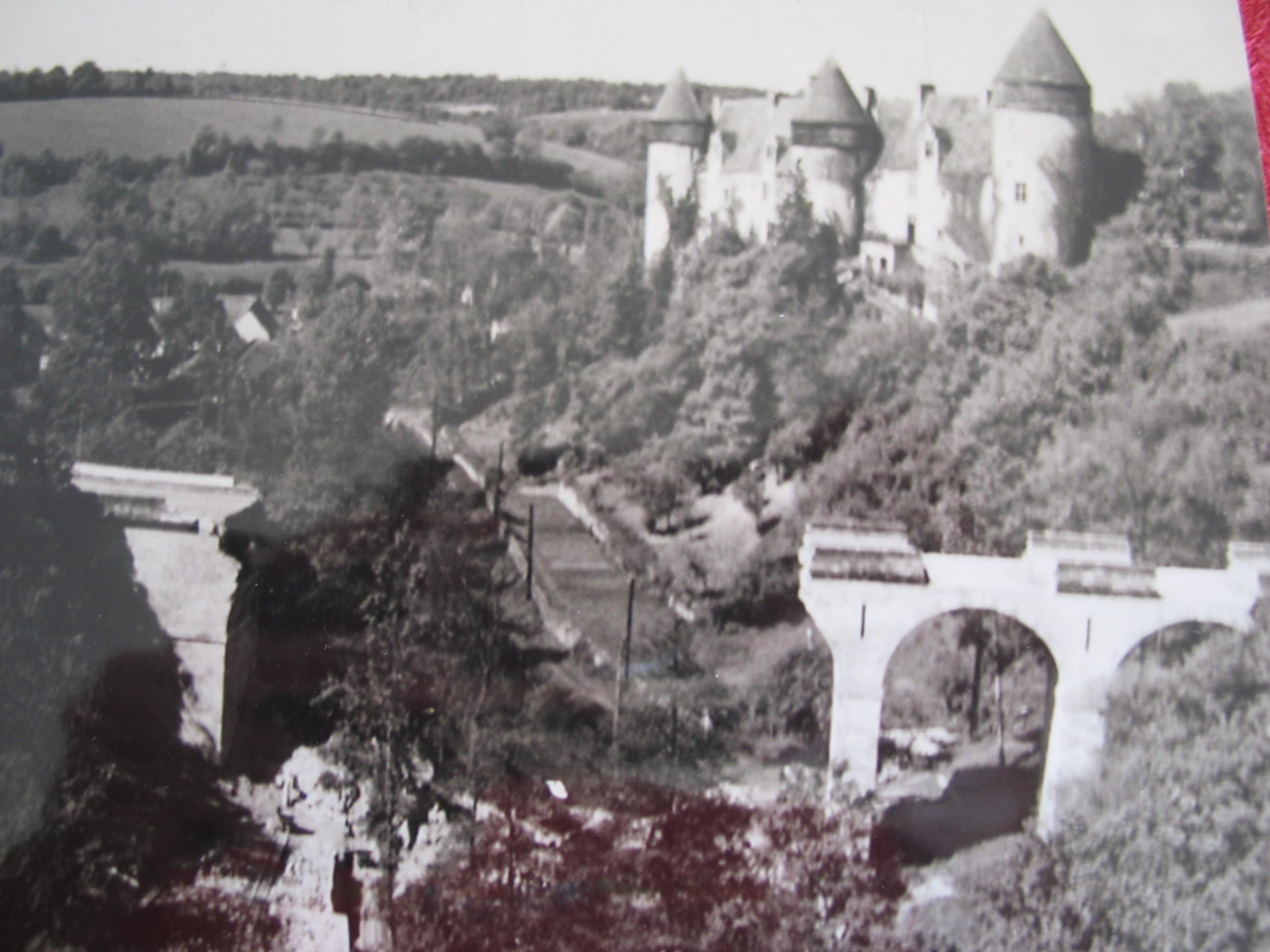 Culan (Cher, France) - Le château et le pont dynamité.